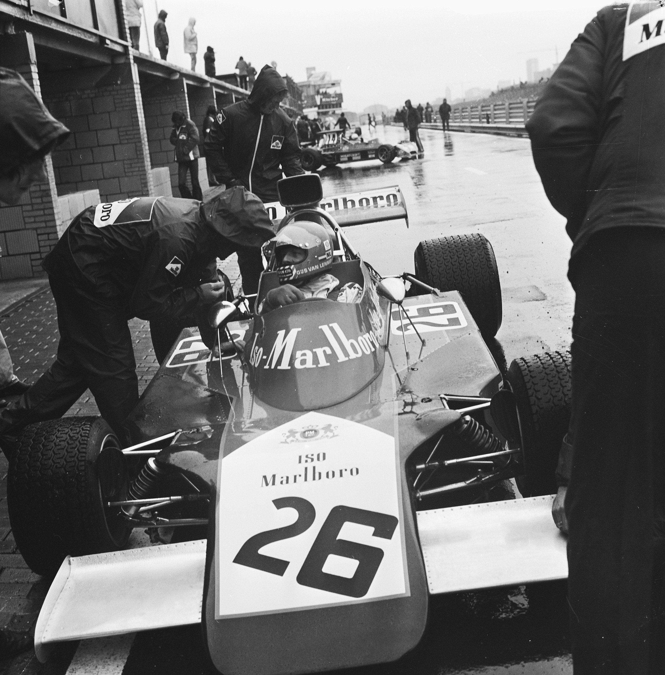 Gijs van Lennep in zijn wagen inde pitsstraat